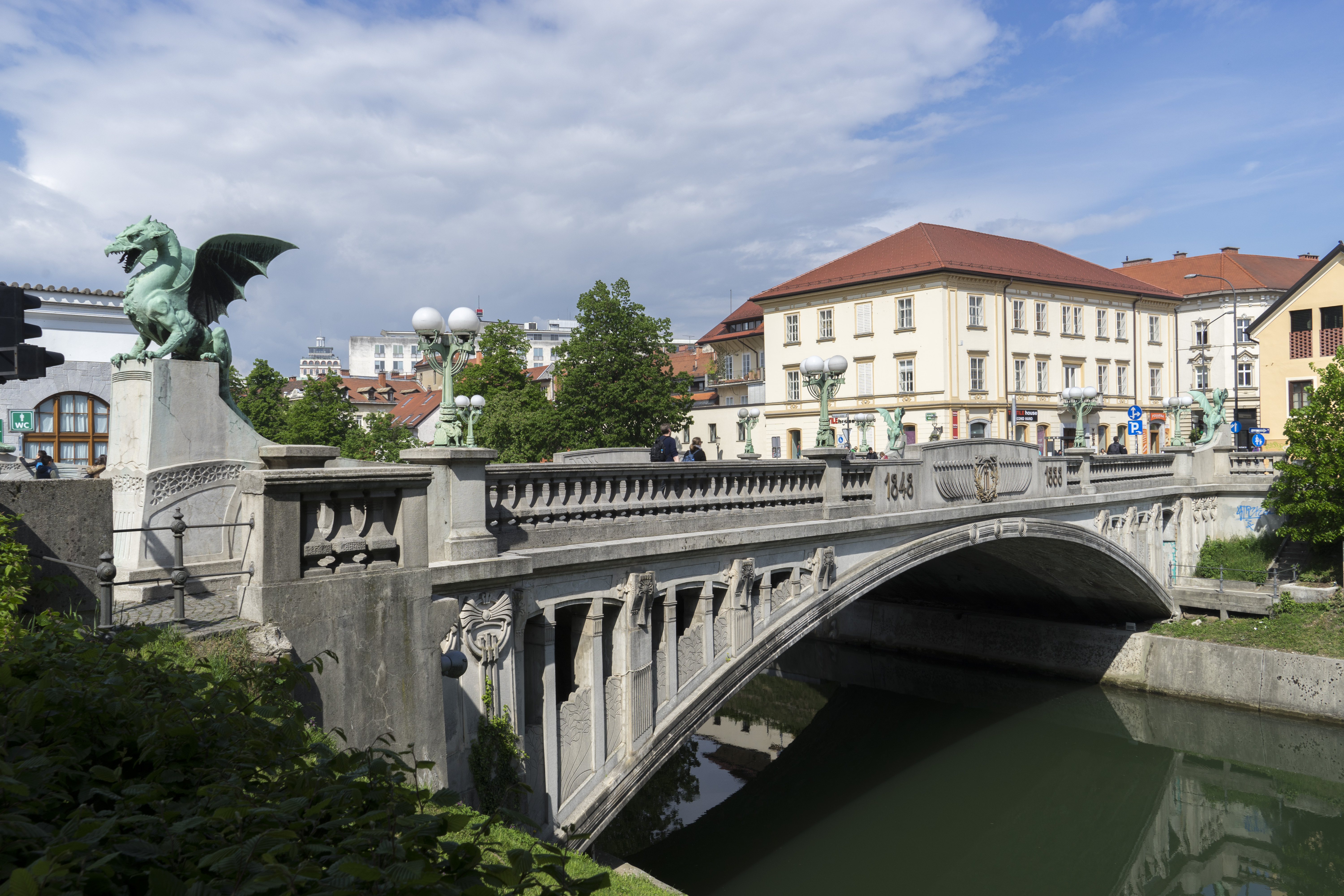 Dragons Bridge, Ljubljana